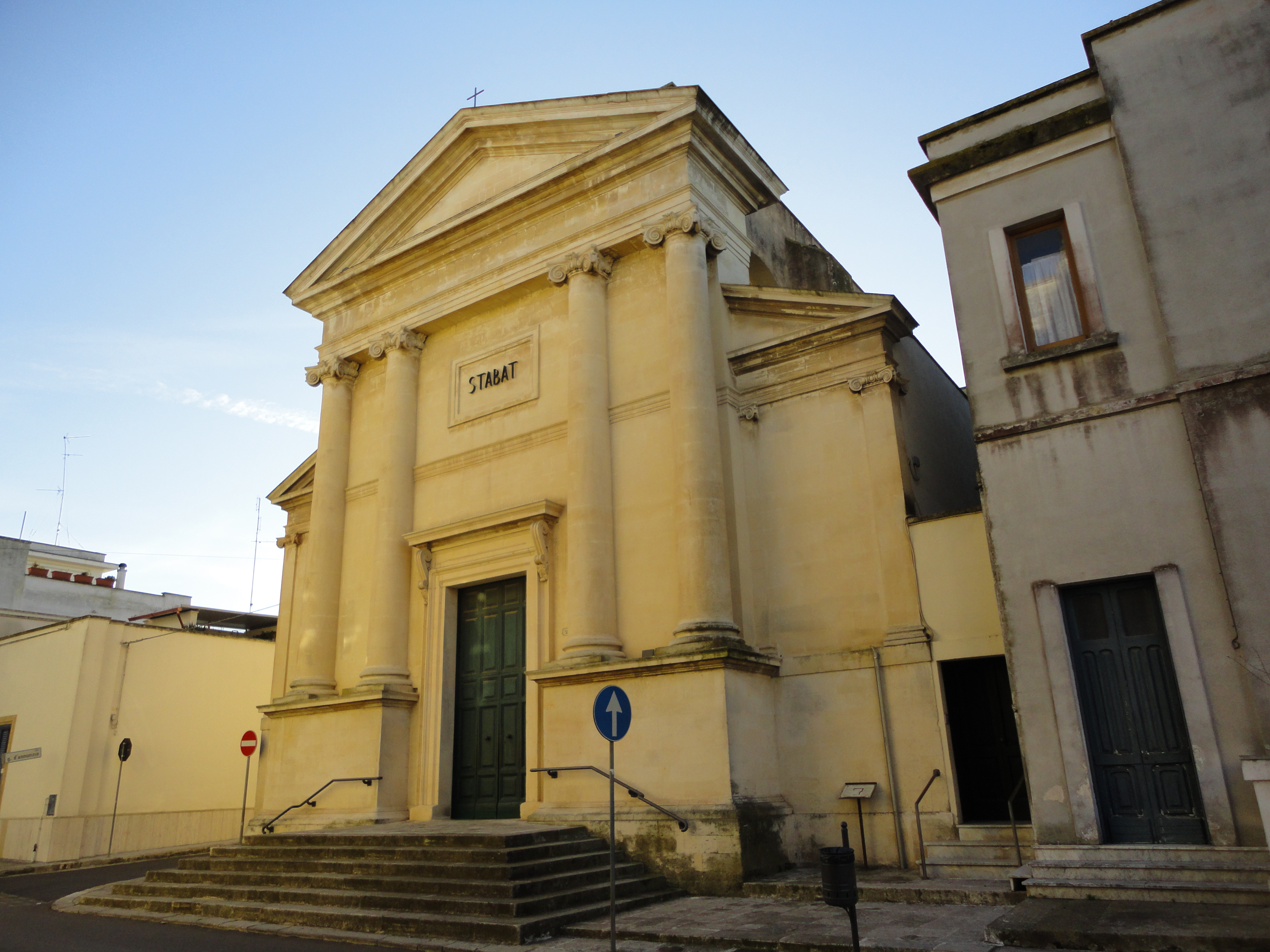 Chiesa dell'Addolorata Trepuzzi, Lecce